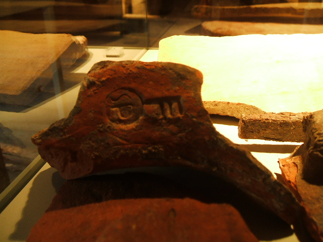 Das Foto zeigt Details des Museumshauses in der Mönchstraße in Stralsund im März 2007.